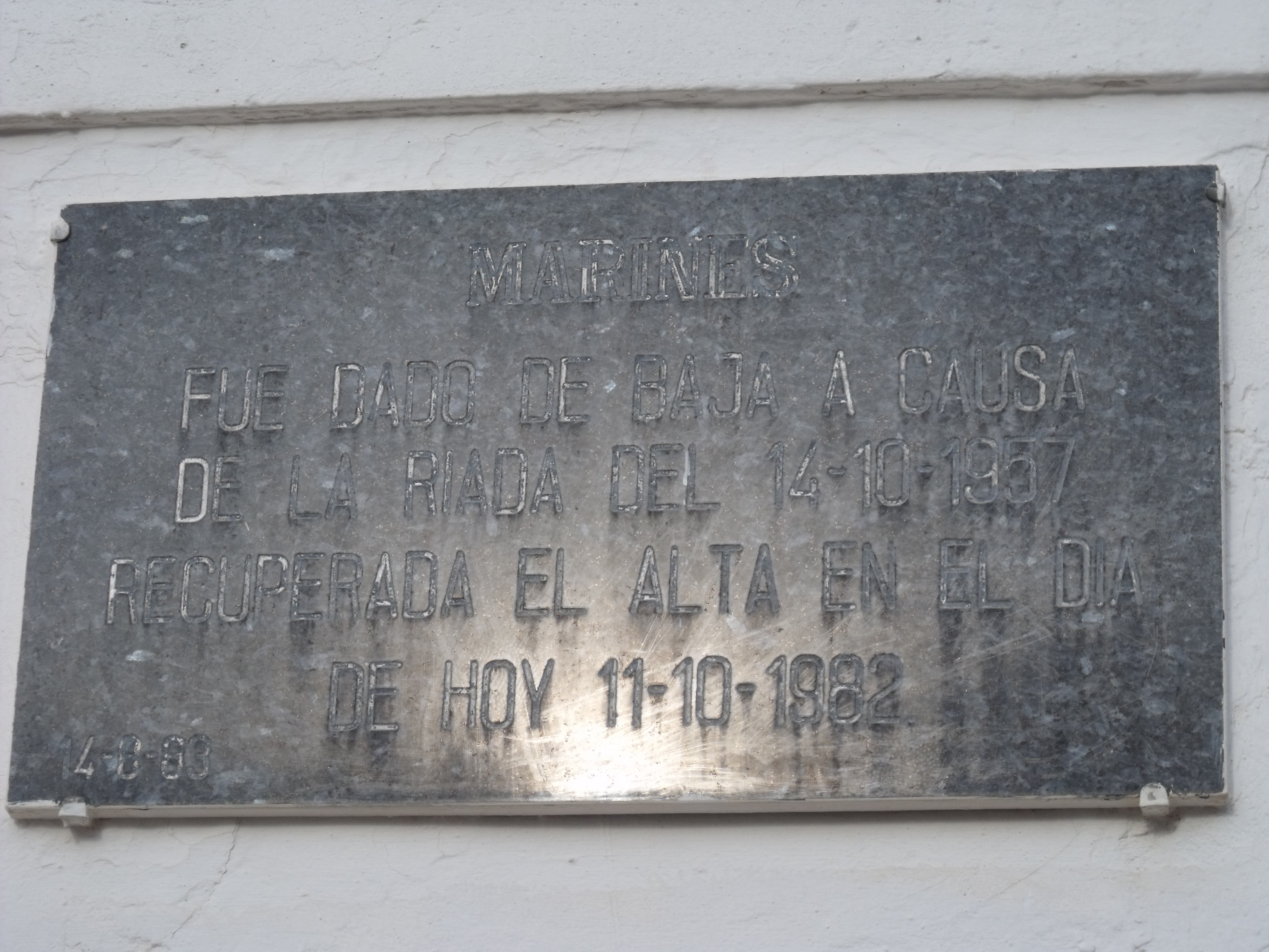 Placa historia de marines el Viejo